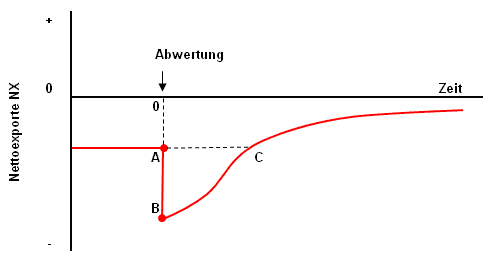 J-Kurve